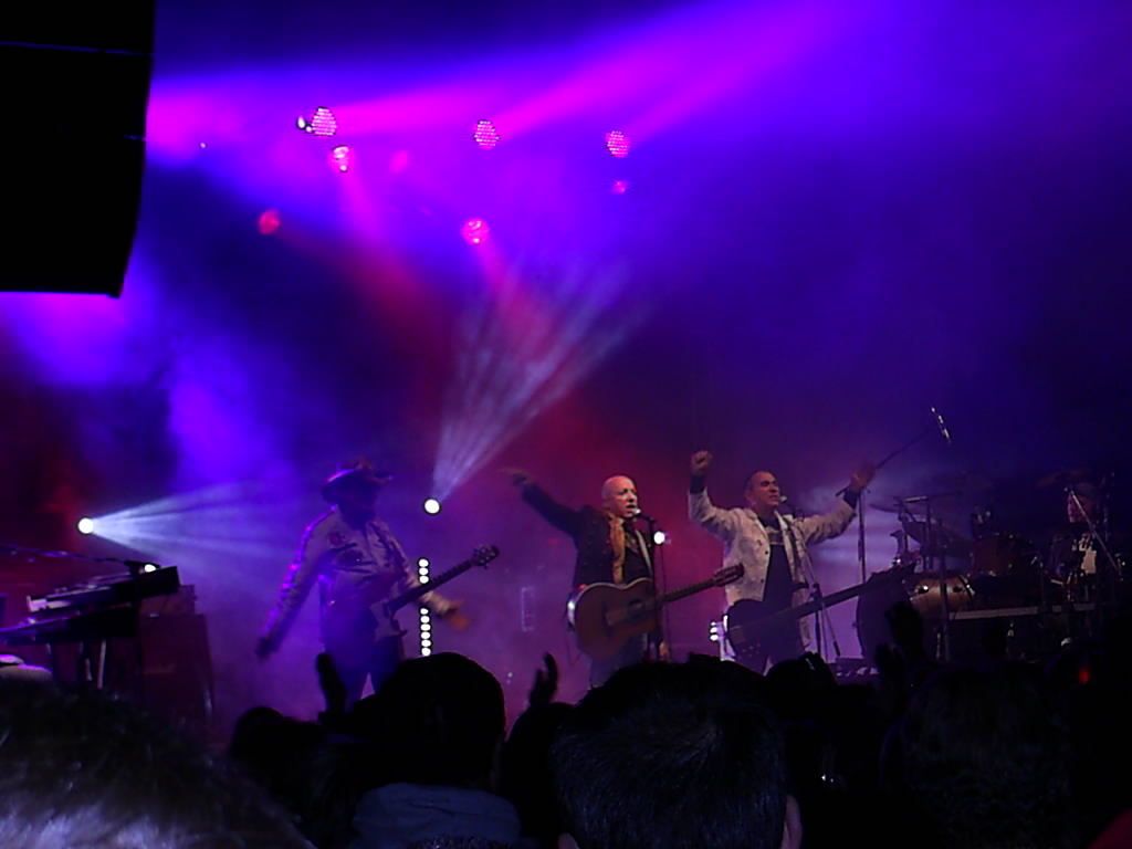 City beim Stadt- und Schützenfest in Seelow 2010